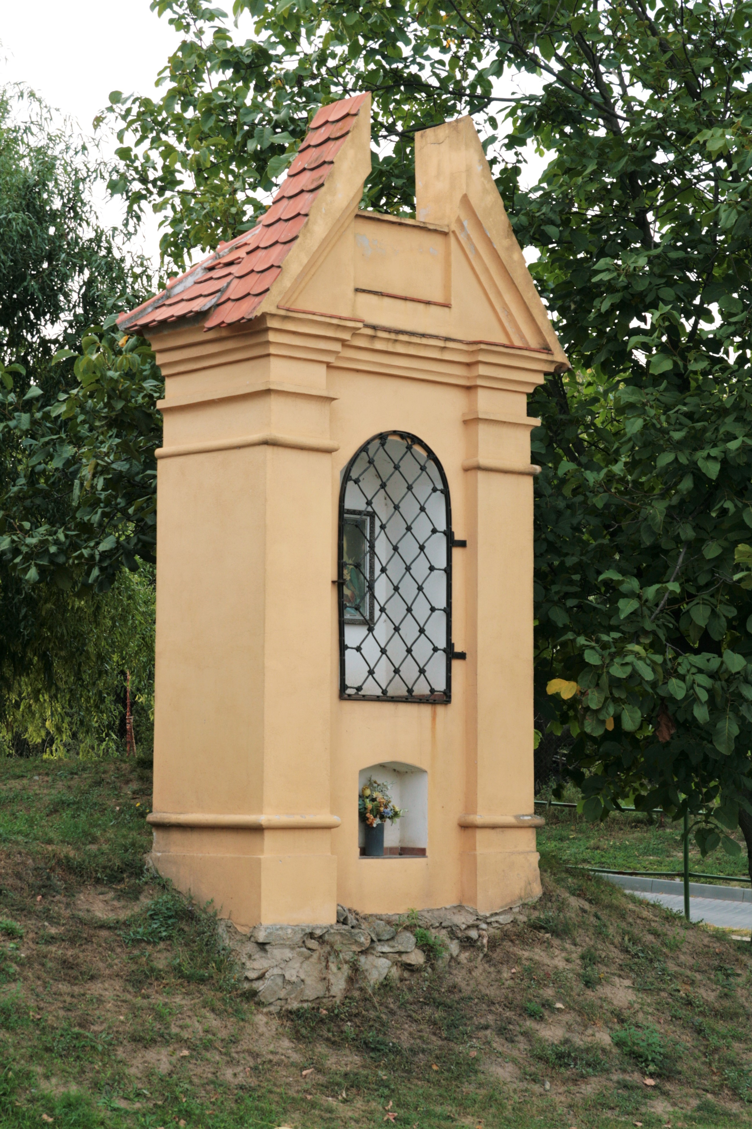 Nový Šaldorf, část obce Nový Šaldorf - Sedlešovice v okrese Znojmo. Výklenková kaplička - poklona u silnice na předělu mezi Novýcm Šladorfem a Sedlešovicemi.